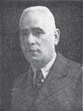 Антон Димитров.